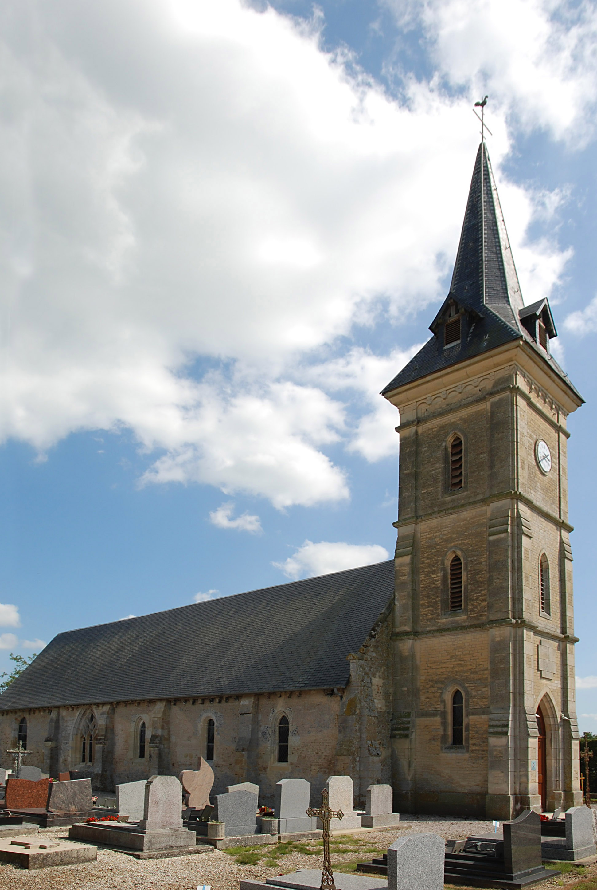 Monteille (Calvados)